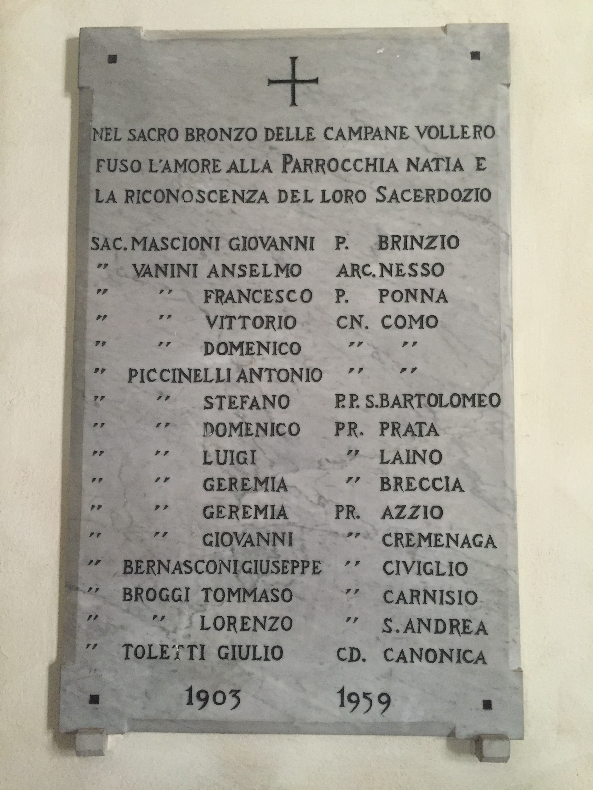 Lapide custodita entro la cappella laterale della chiesa dei Santi Pietro e Paolo in Brinzio (VA) riportante la lista dei sacerdoti che nel 1903 co-finanziarono l'acquisto delle cinque campane bronzee da installare sul campanile.